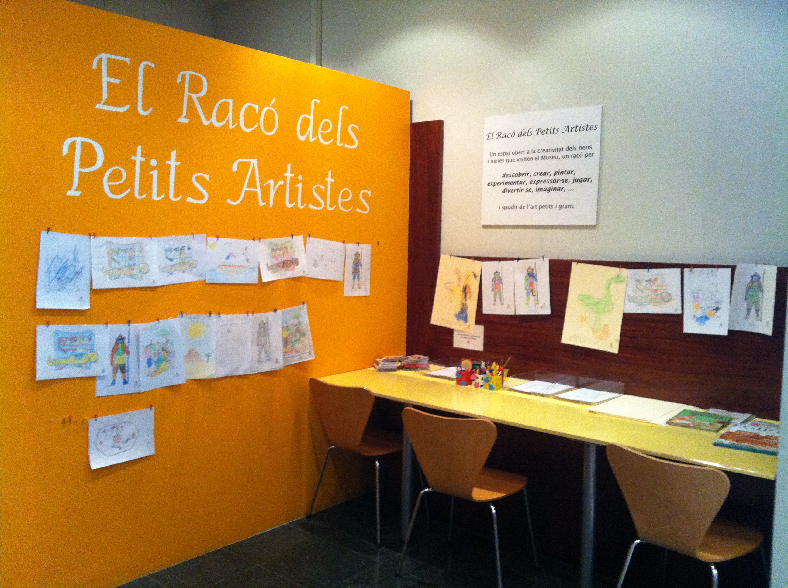 Biblioteca Museu Víctor Balaguer- El Racó dels petits artistes